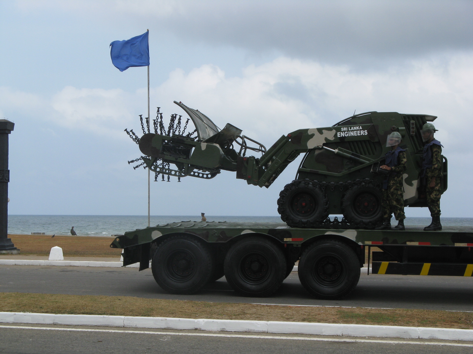 Demining Unit - Sri Lanka Army